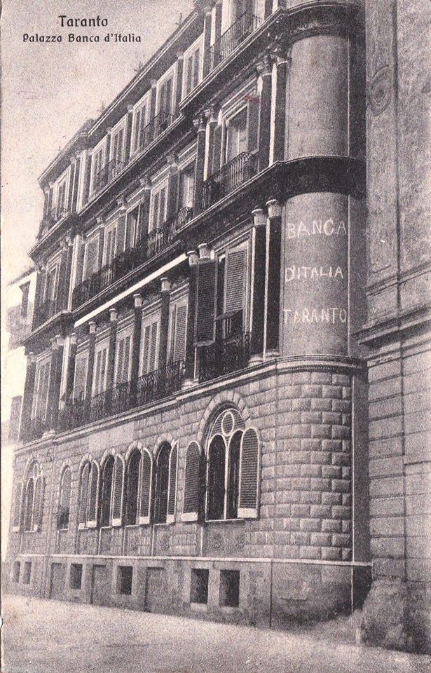 Il palazzo in una foto del !916